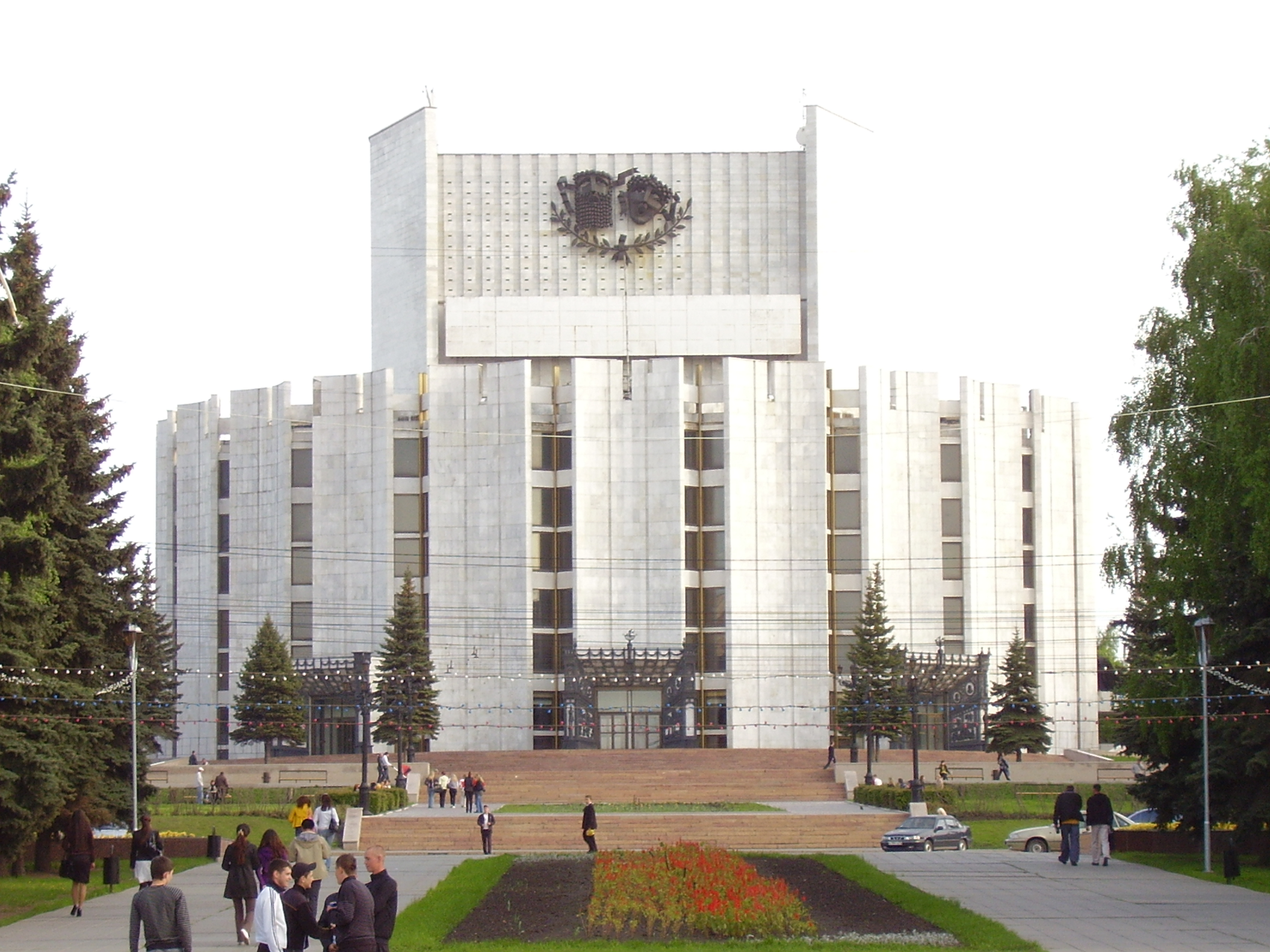 Один из красивейших и больших театров города Челябинска.